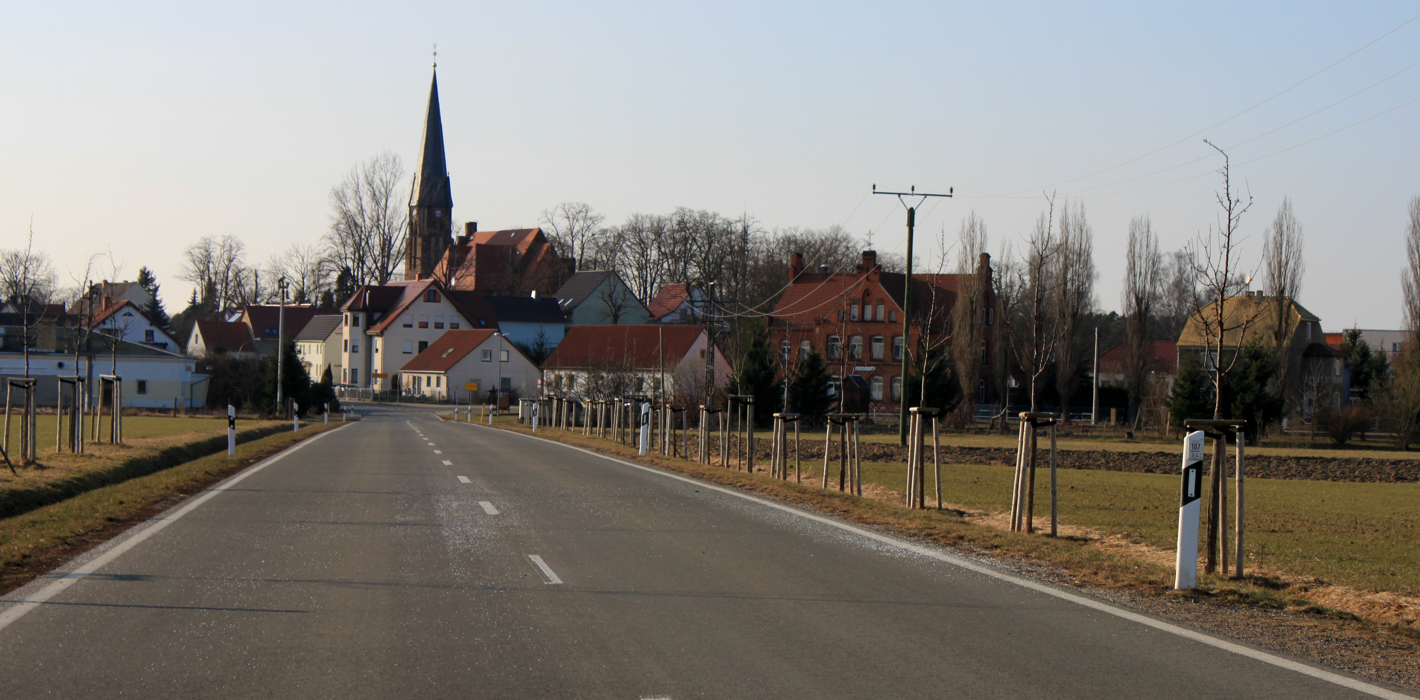 Straße von Südost